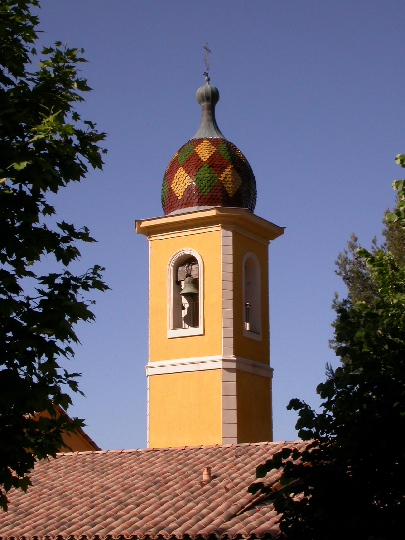 Église Saint-Blaise